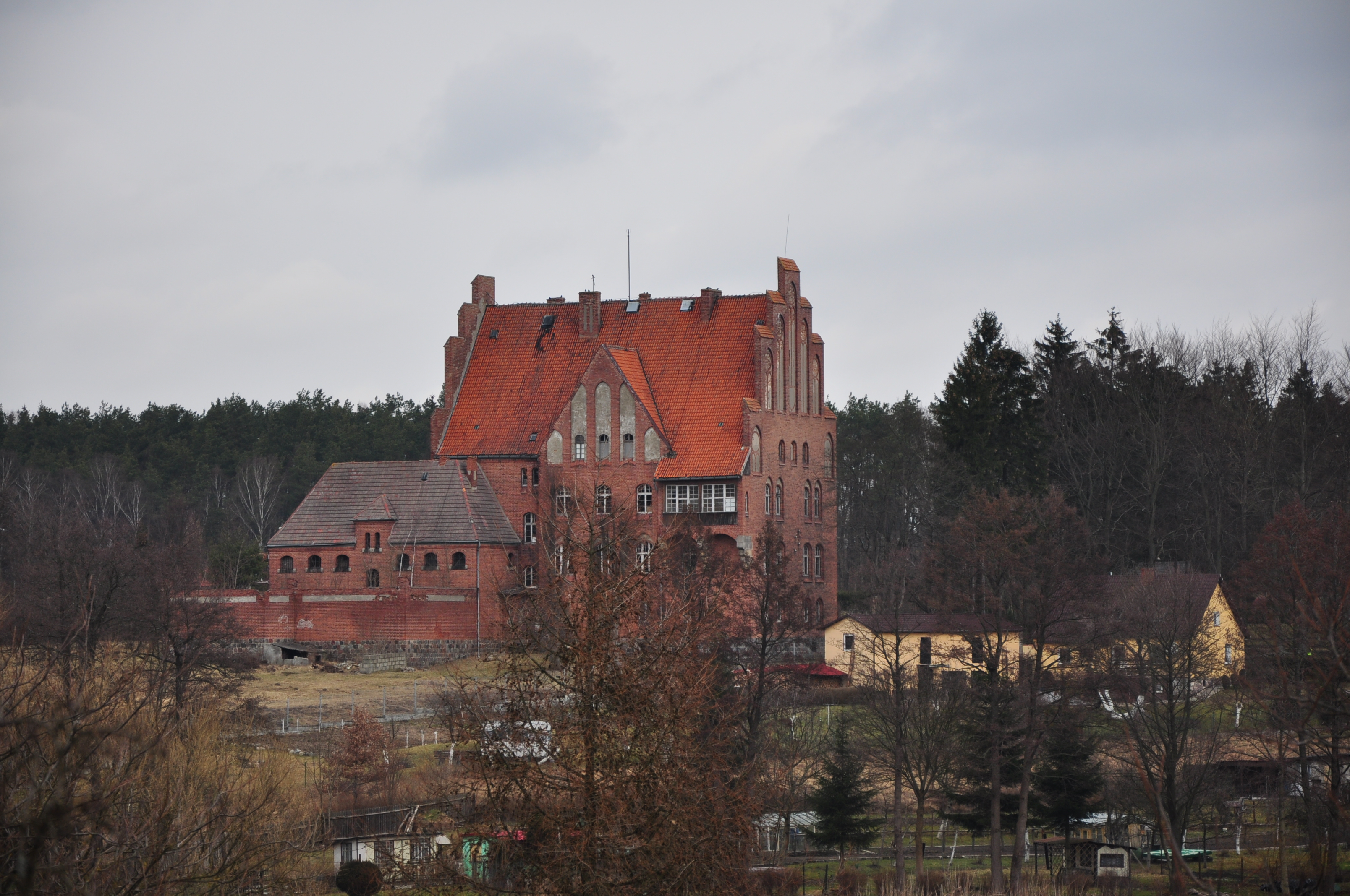 Biały Bór.